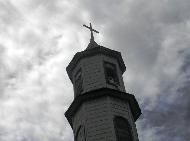 Parte de la torre-campanario de la Iglesia Nuestra Señora de los Dolores, Dalcahue, Chiloé, Chile.